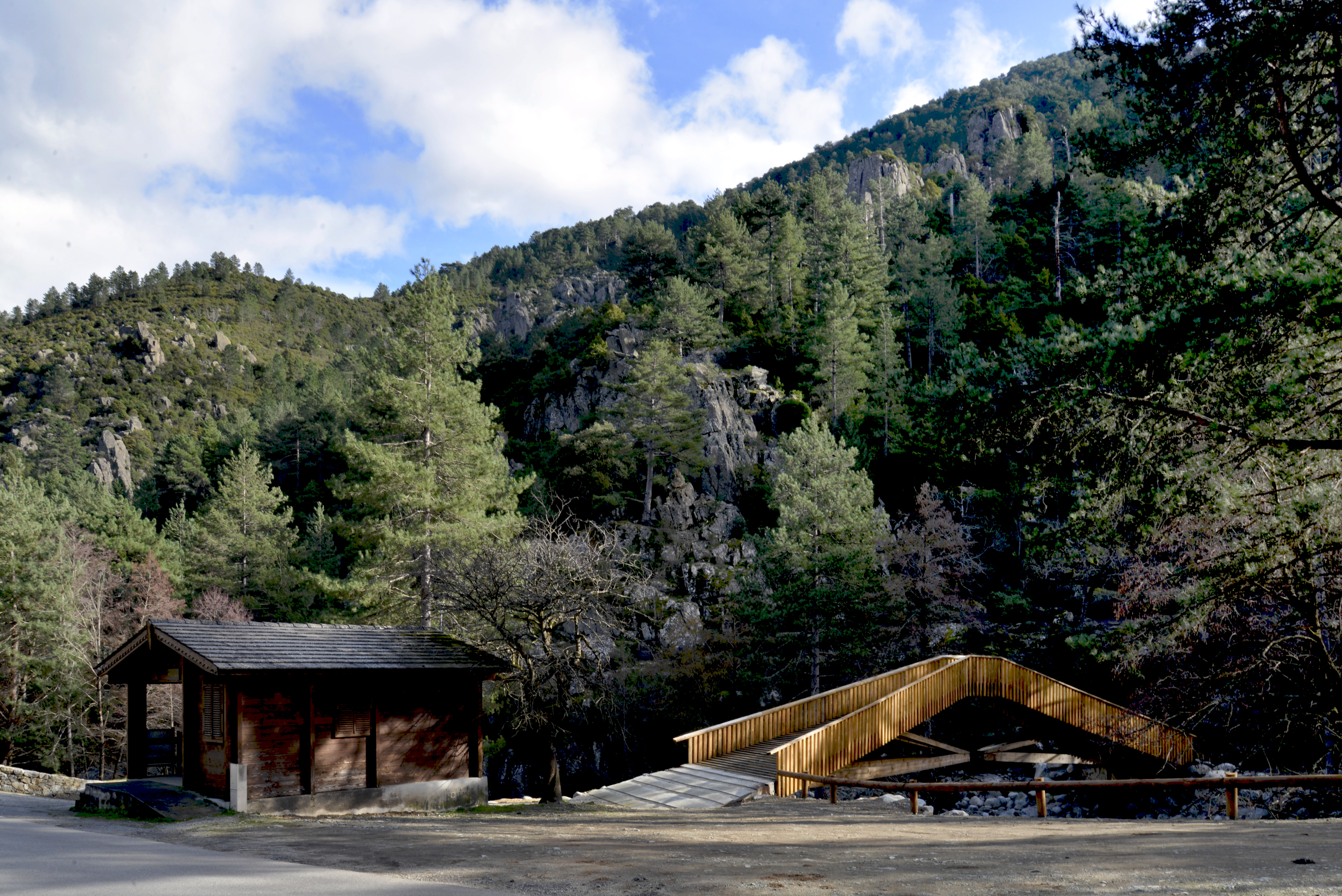 Corte, Centre Corse - Dans la vallée de la Restonica classée, la Maison du Parc et la passerelle sur la Restonica à Zurmulu.